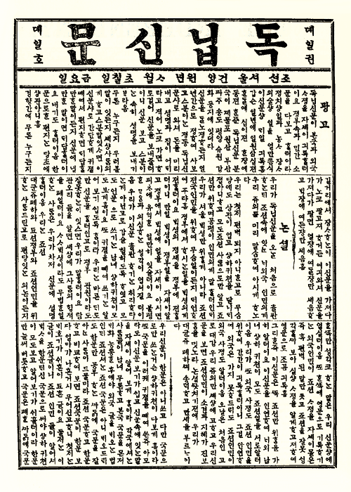 독립신문 1897.04.07 금요일자